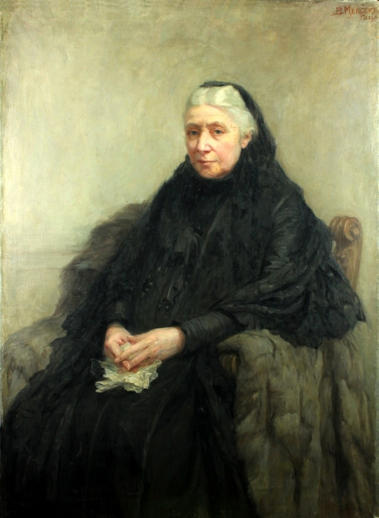 Portret Marii Goreckiej, córki Adama Mickiewicza